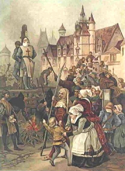 Die Hinrichtung Jacques de Molays (* zwischen 1244 und 1250, † 1314, letzter Großmeister des Tempelritter-Ordens)